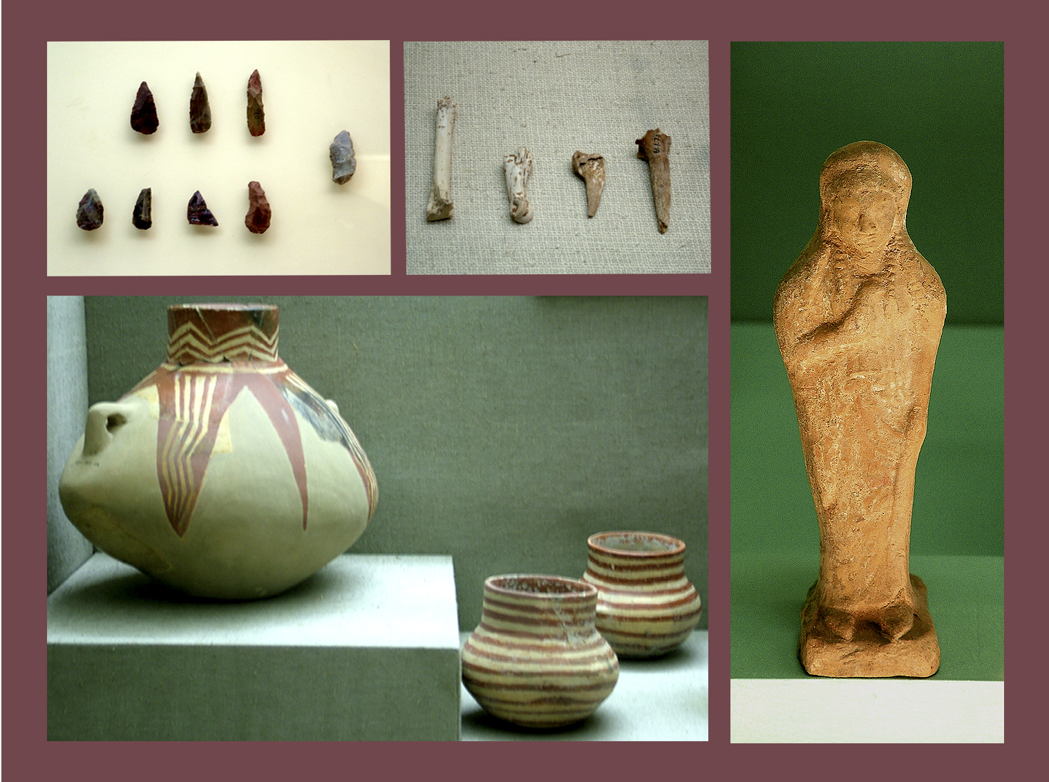 Antalya, Törökország: a Régészeti Múzeum egyes leleteinek montázsa